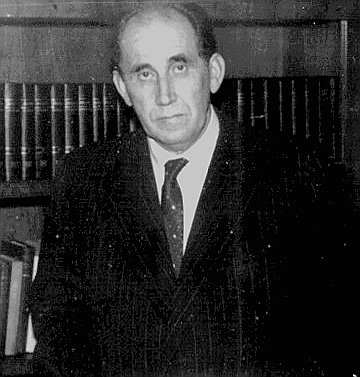 Jovan Marinovic (1908-1982), fotografija iz porodicne zbirke